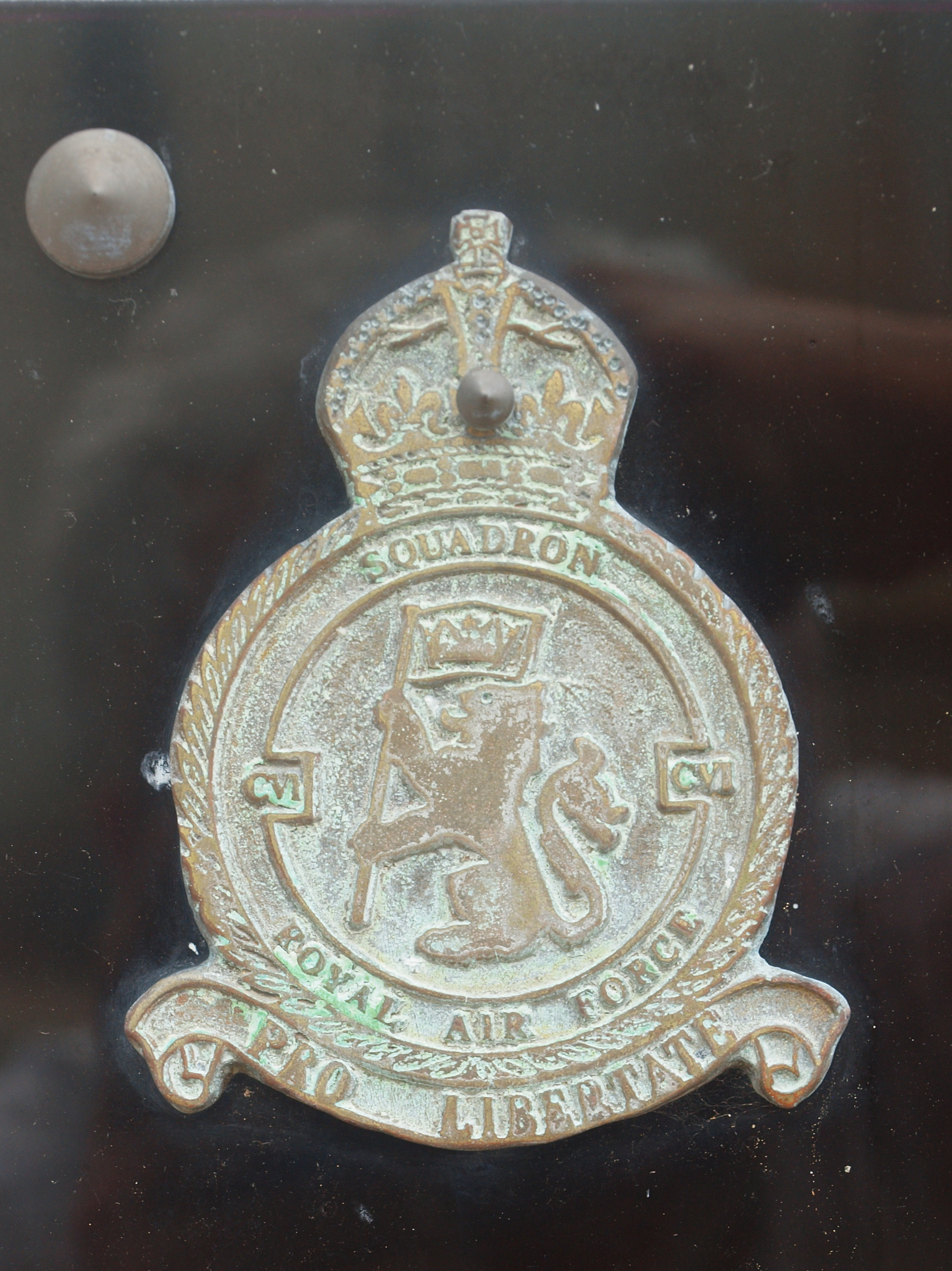 Ouzouer-le-Doyen (Loir-et-Cher, France)